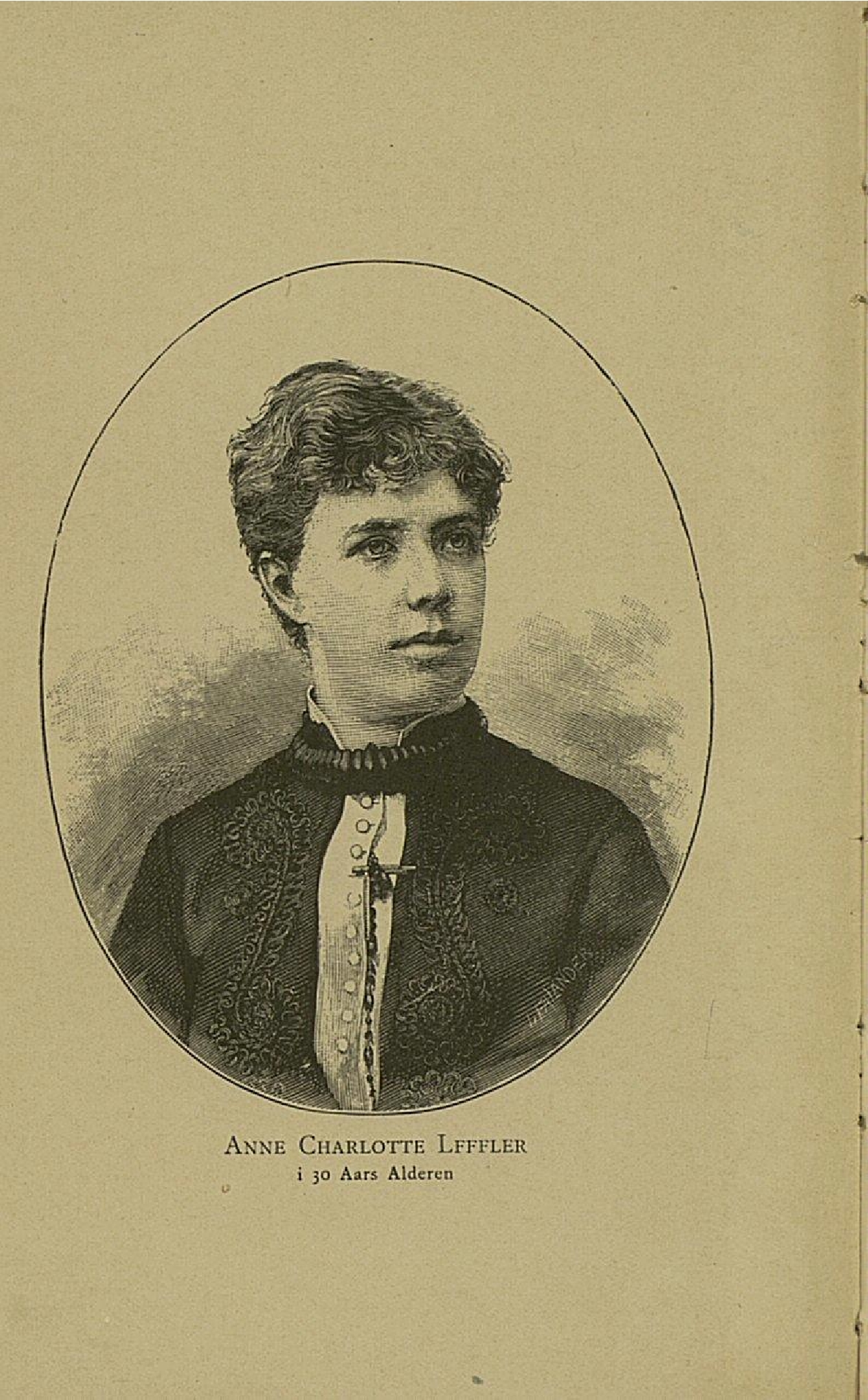 Bilde fra boken